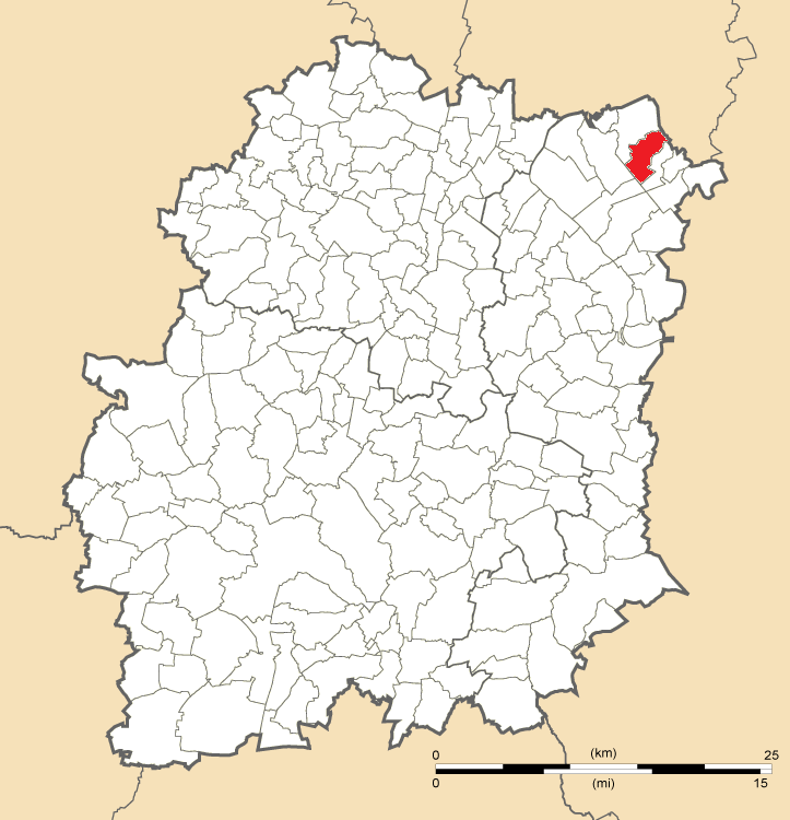 Carte de position de Brunoy en Essonne